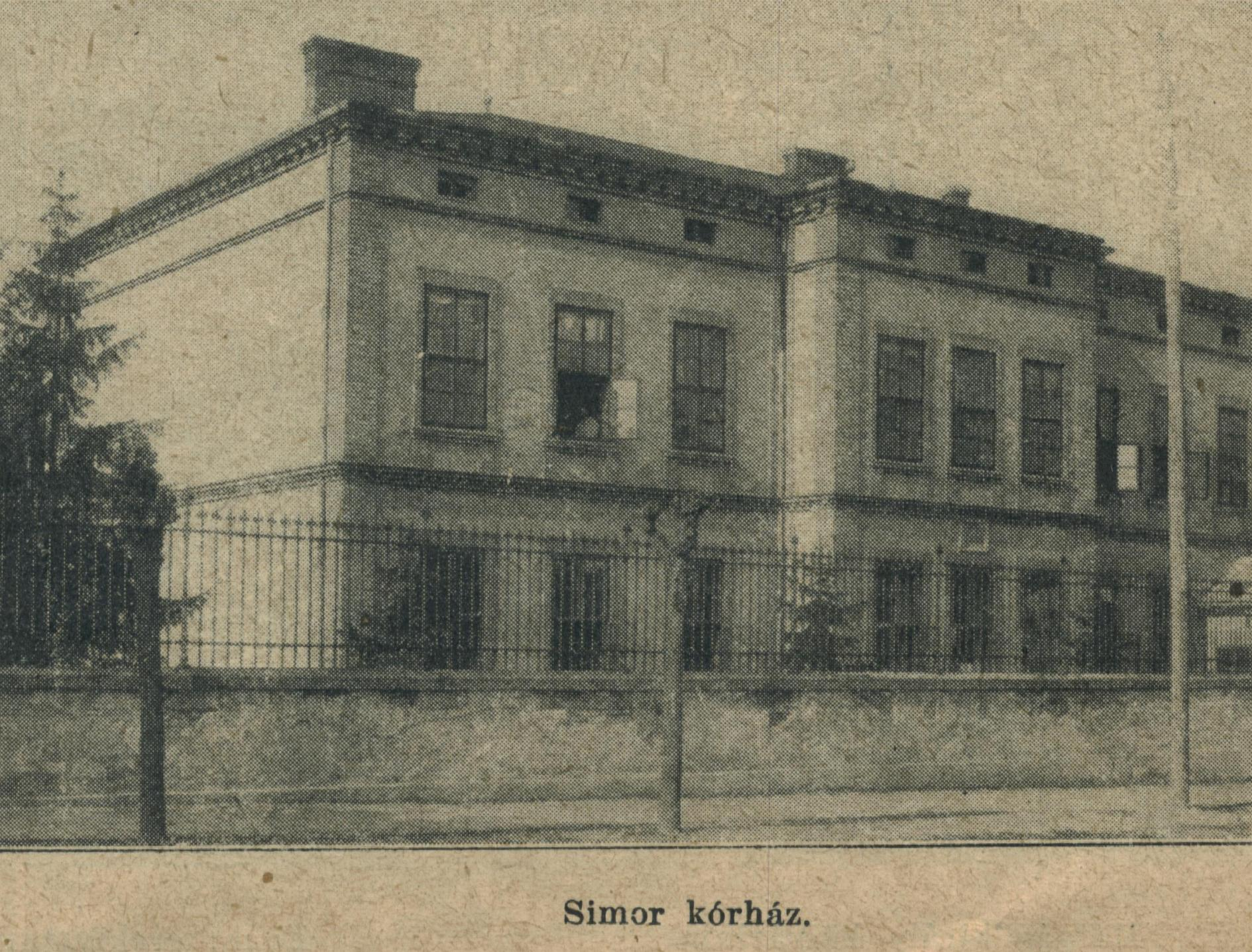 Esztergom, Simor Kórház, volt Vörös Kereszt Kórház